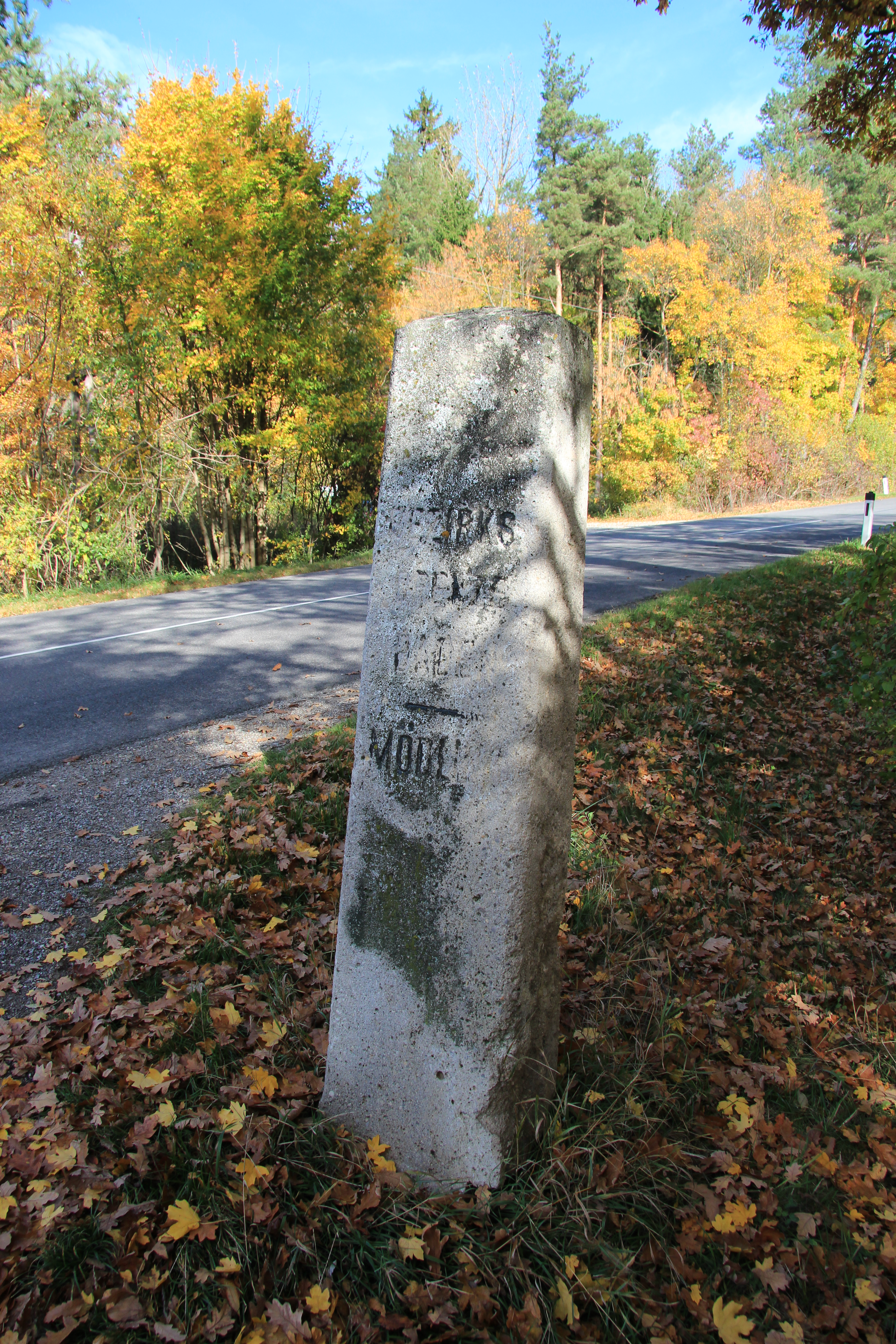 Grenzstein zwischen den beiden Bezirken Baden und Mödling gleichzeitig Grenze Siegenfeld-Gaaden an der L2099 in Niederösterreich